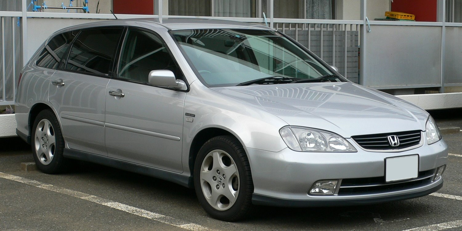 Honda Avancier (Nouvelle Vague)(2001 - 2003)